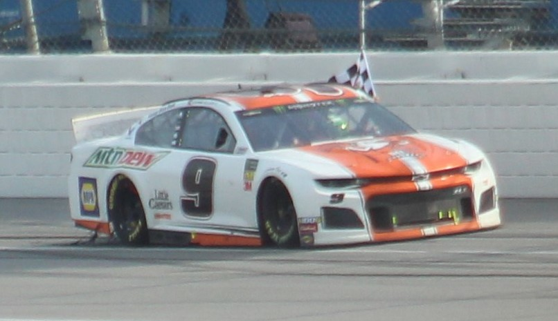 2019 GEICO 500